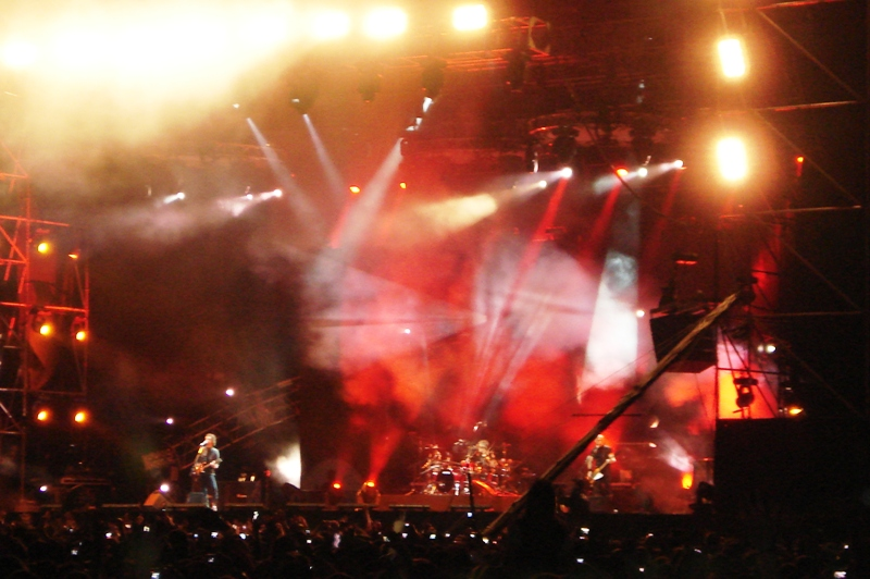 Concierto de Soda Stereo en el Estadio Nacional durante su gira Me verás volver.